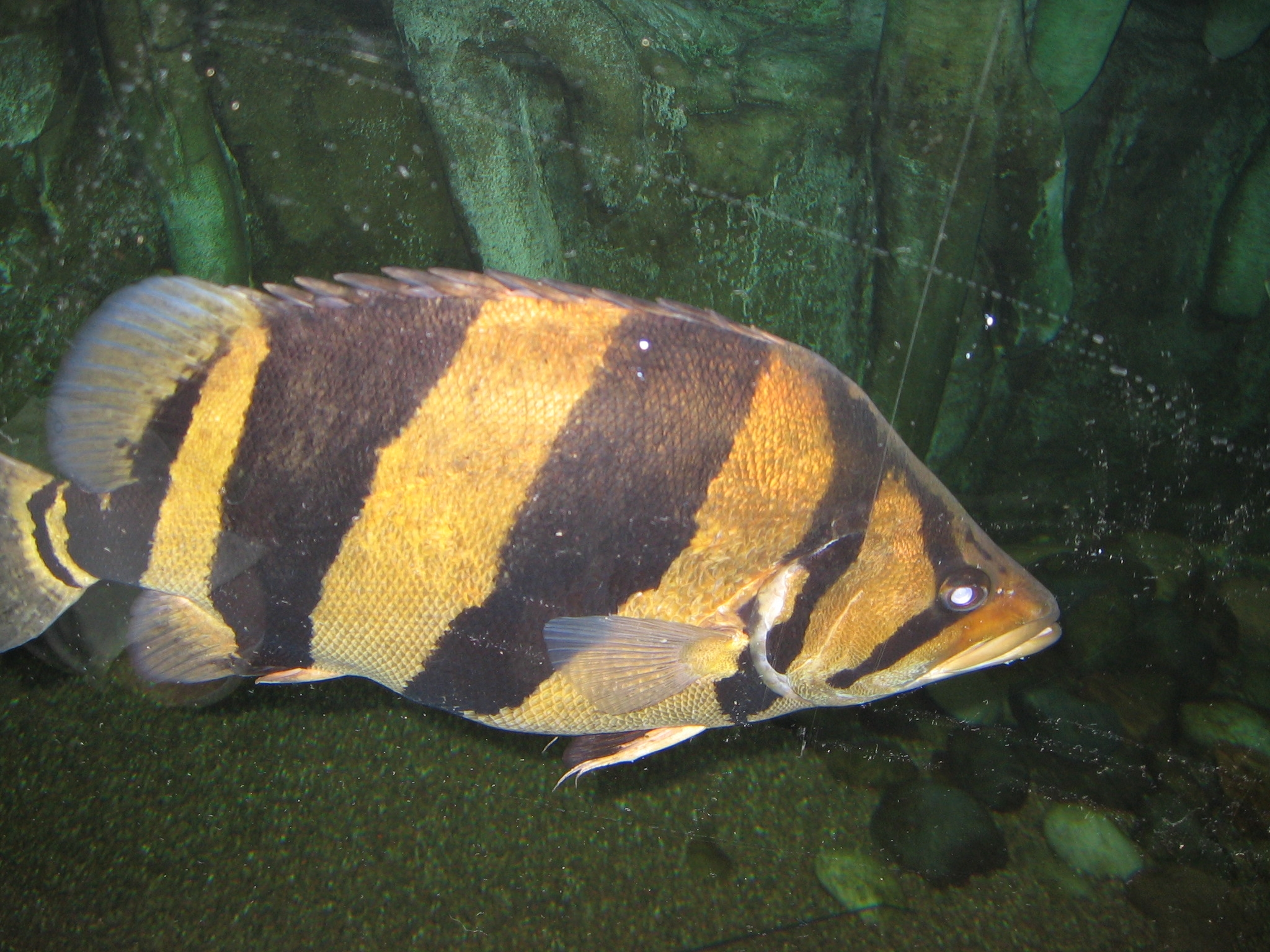 Siamese Tigerfish (Datnioides pulcher)